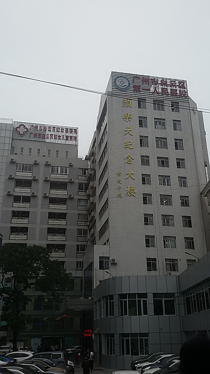 粵語: 廣州市白雲區第一人民醫院